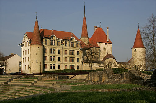 Avenches: Amphitheater / Schulhaus / Schloss